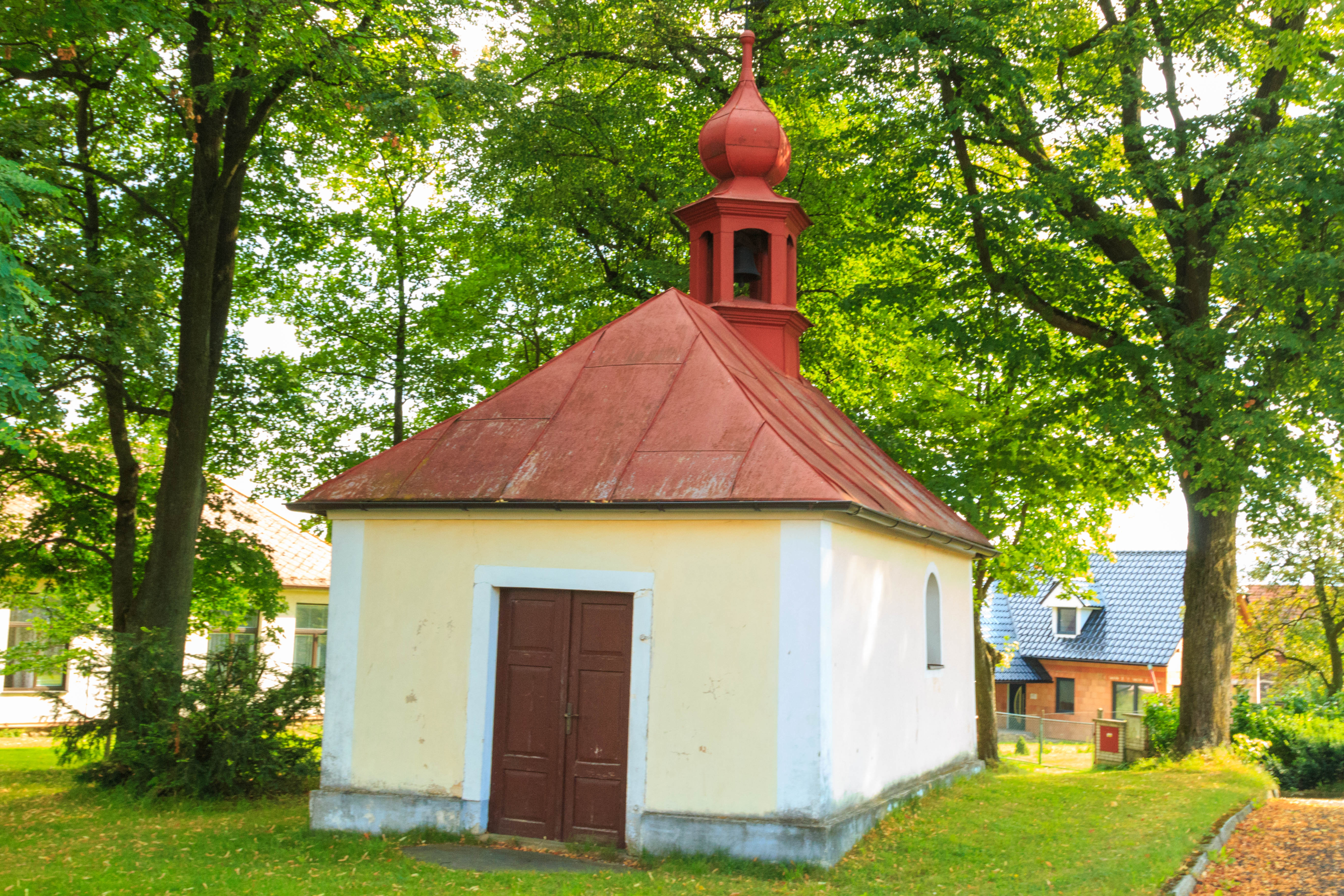 Jilem kaple